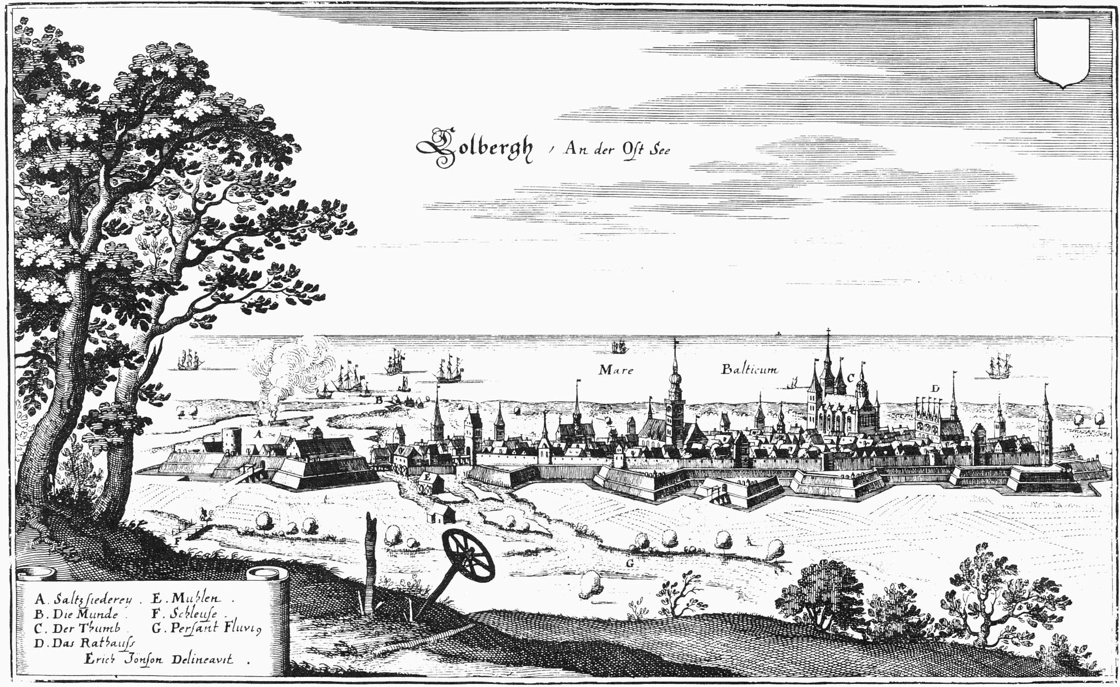 Ansicht von Kolberg von Süden Kaszëbsczi: Panorama Kòlberga z 1652 rokù wedle Meriana